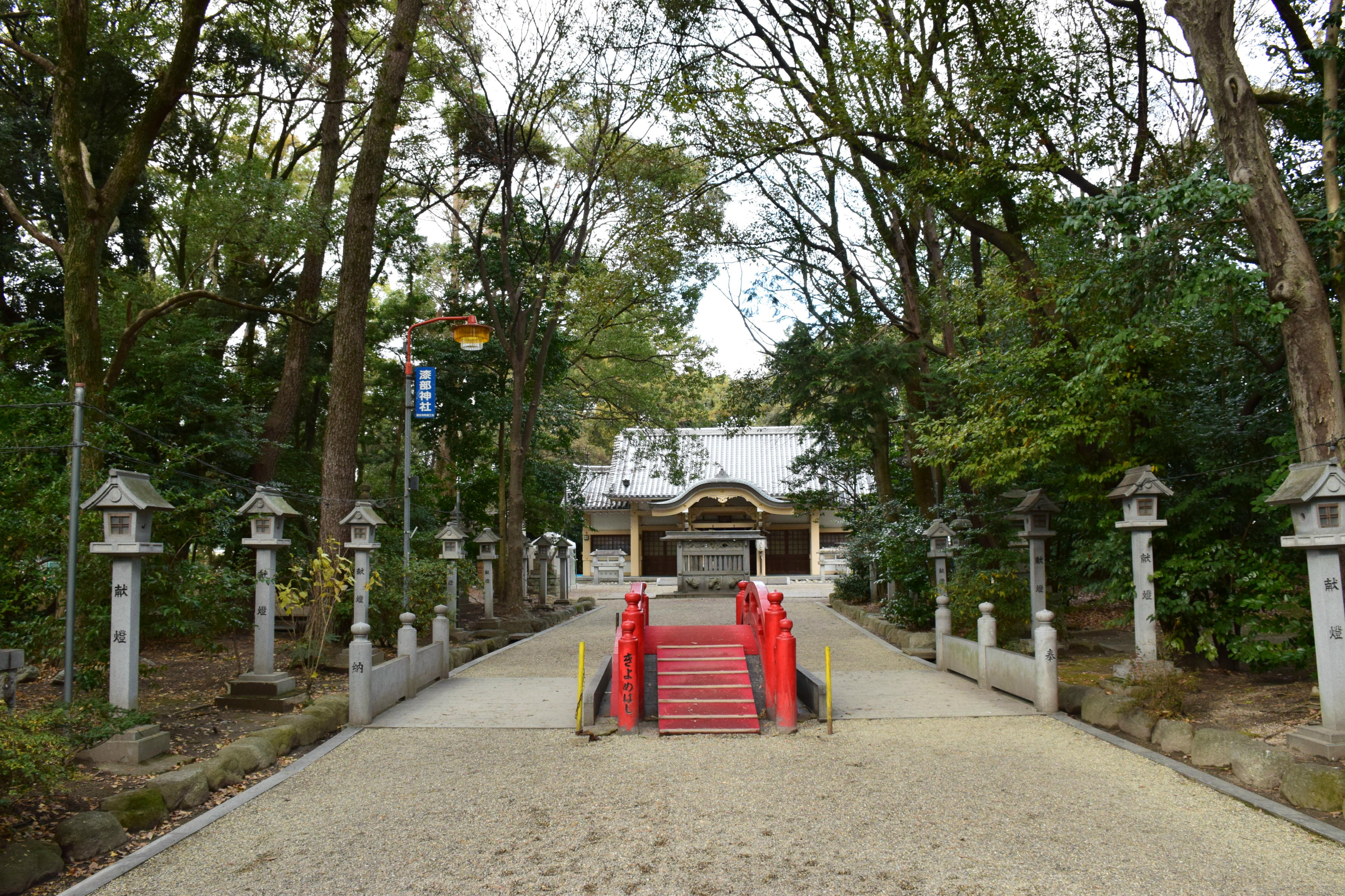 漆部神社参道